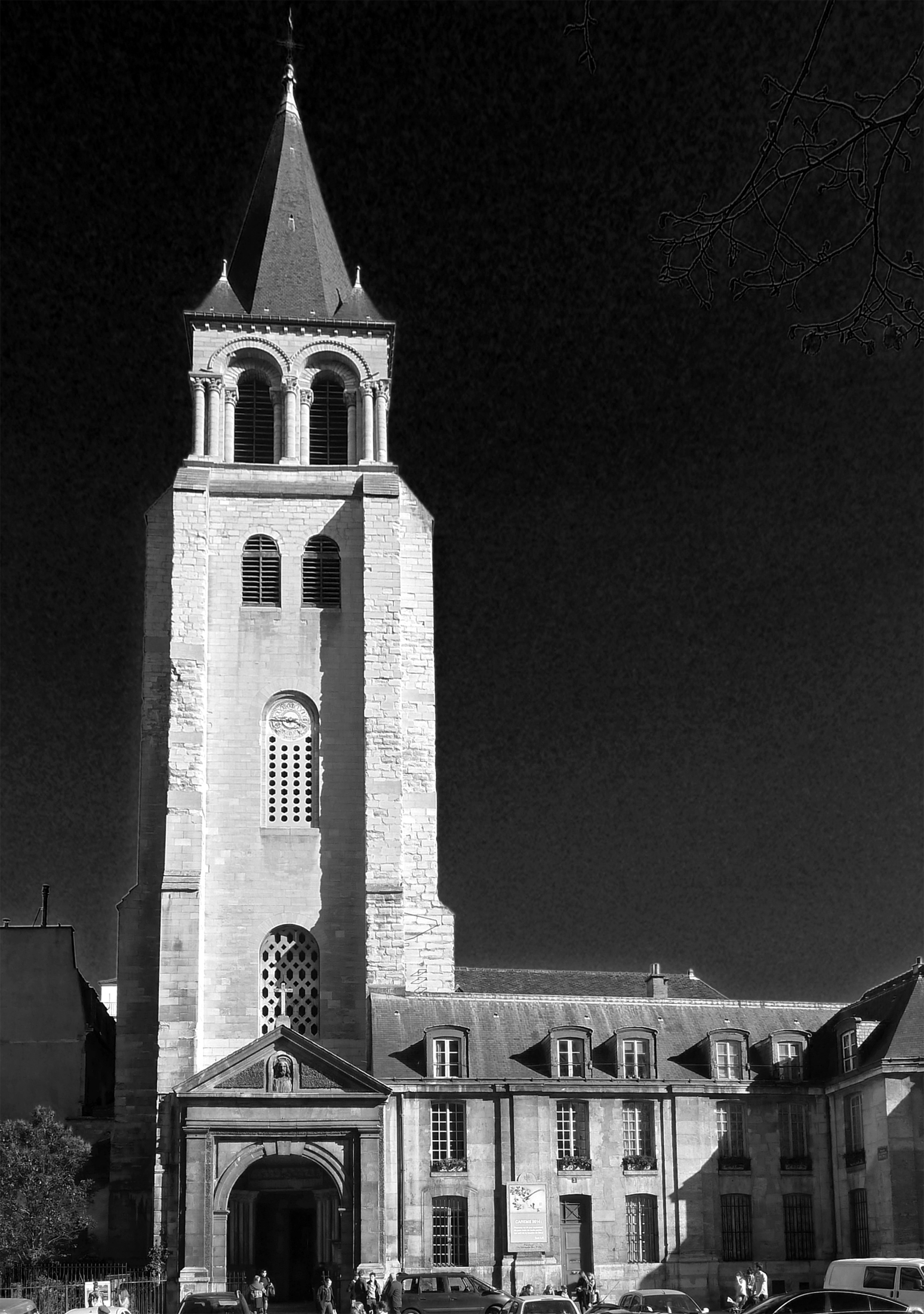 Eglise de Saint-Germain-des-Prés (tour-clocher) - Paris VI This building is en partie classé, en partie inscrit au titre des Monuments Historiques. It is indexed in the Base Mérimée, a database of architectural heritage maintained by the French Ministry of Culture, under the references PA00088489 and PA00088509 .